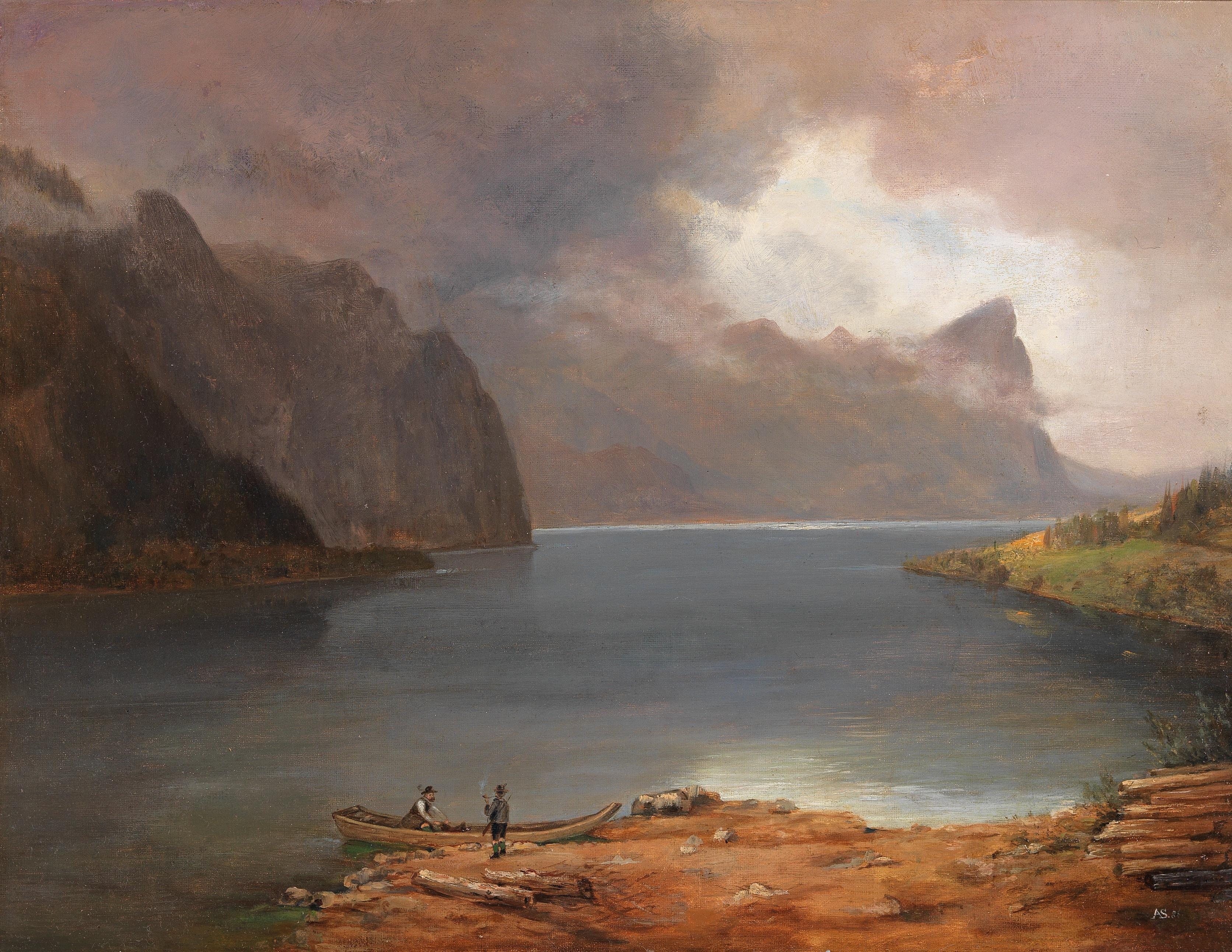 Partie am Mondsee, monogrammiert, datiert AS (18)86, Öl auf Leinwand, 37 x 48 cm